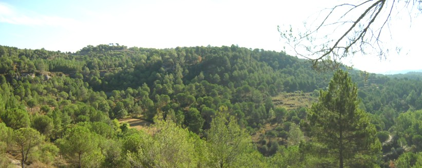 La Beresma (Monistrol de Calders, Moianès)